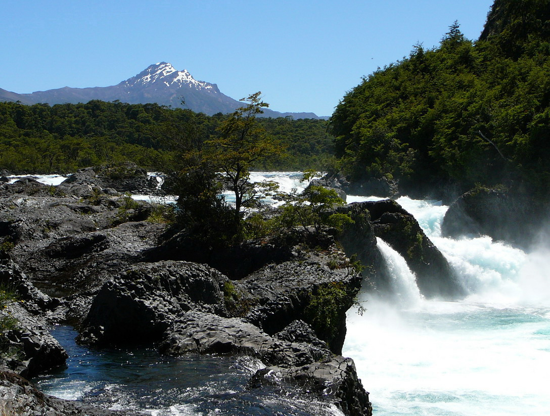 Saltos del Petrohué